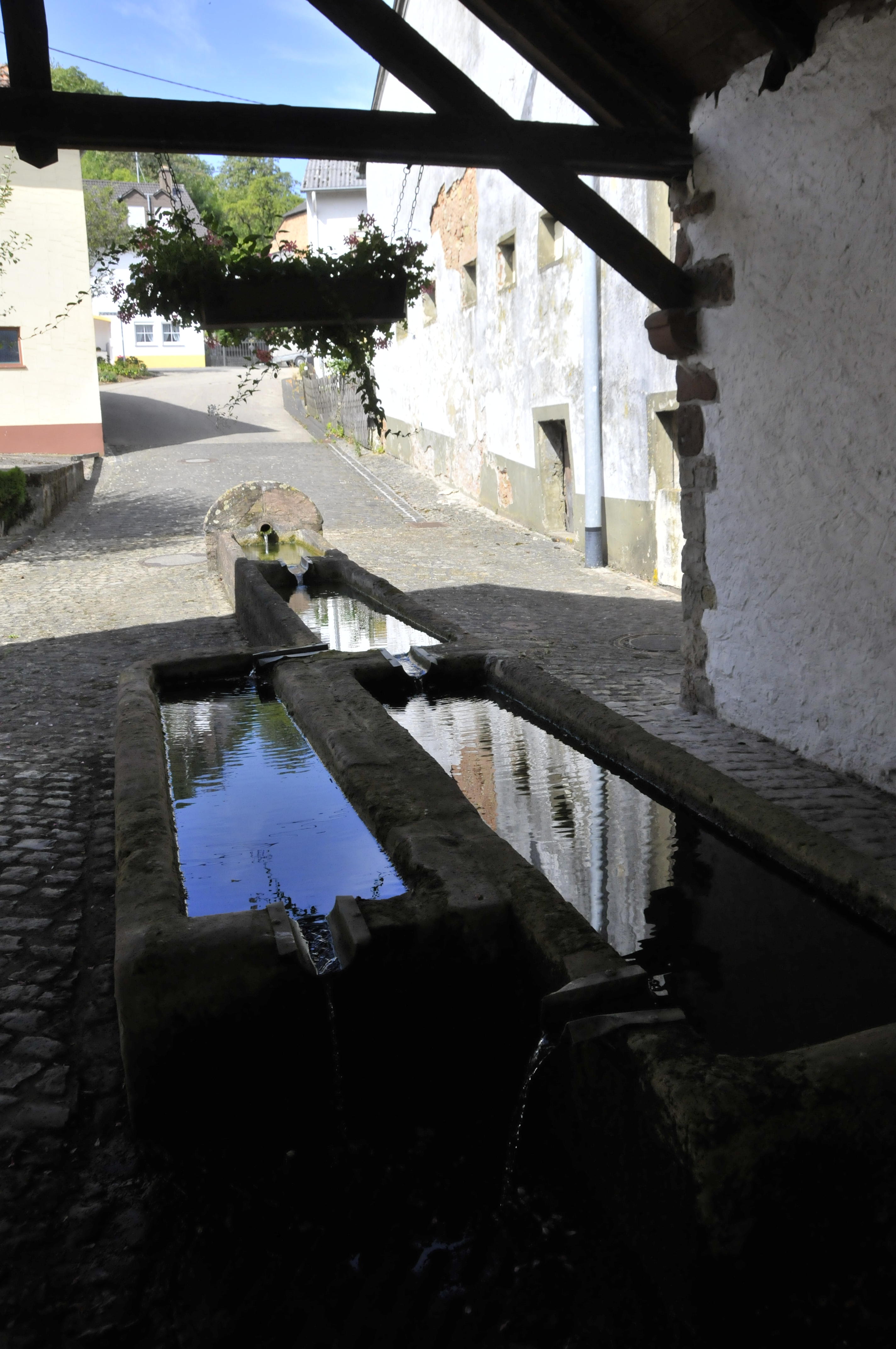 Kelsen, Keysbrunnen